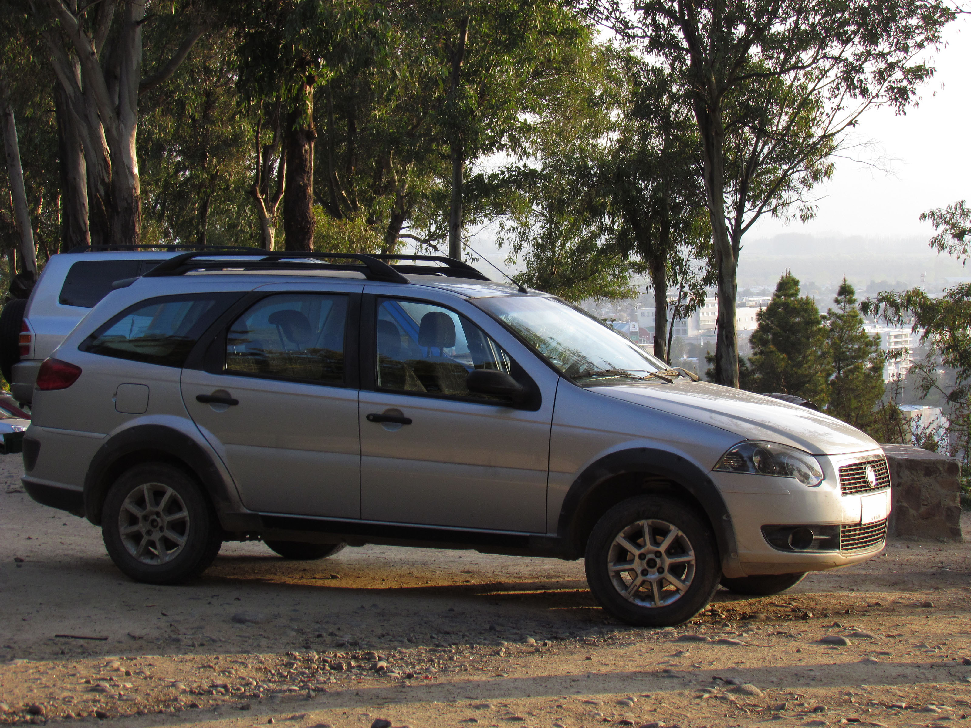 Fiat Palio Weekend 1.4 Trekking 2010